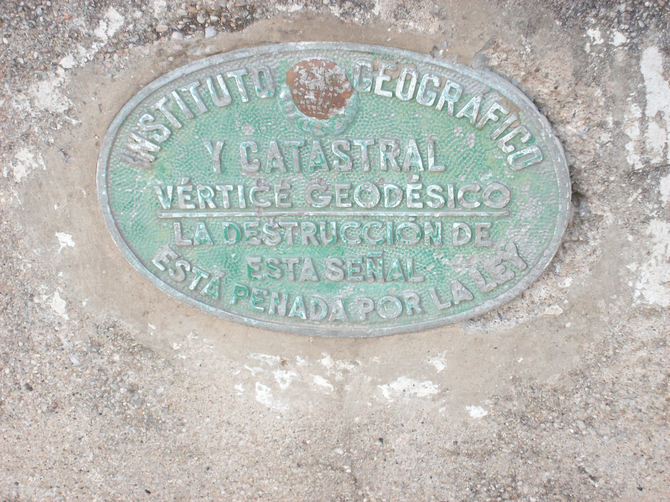 Placa de l'Instituto Geografico,a la Serra de la Petita